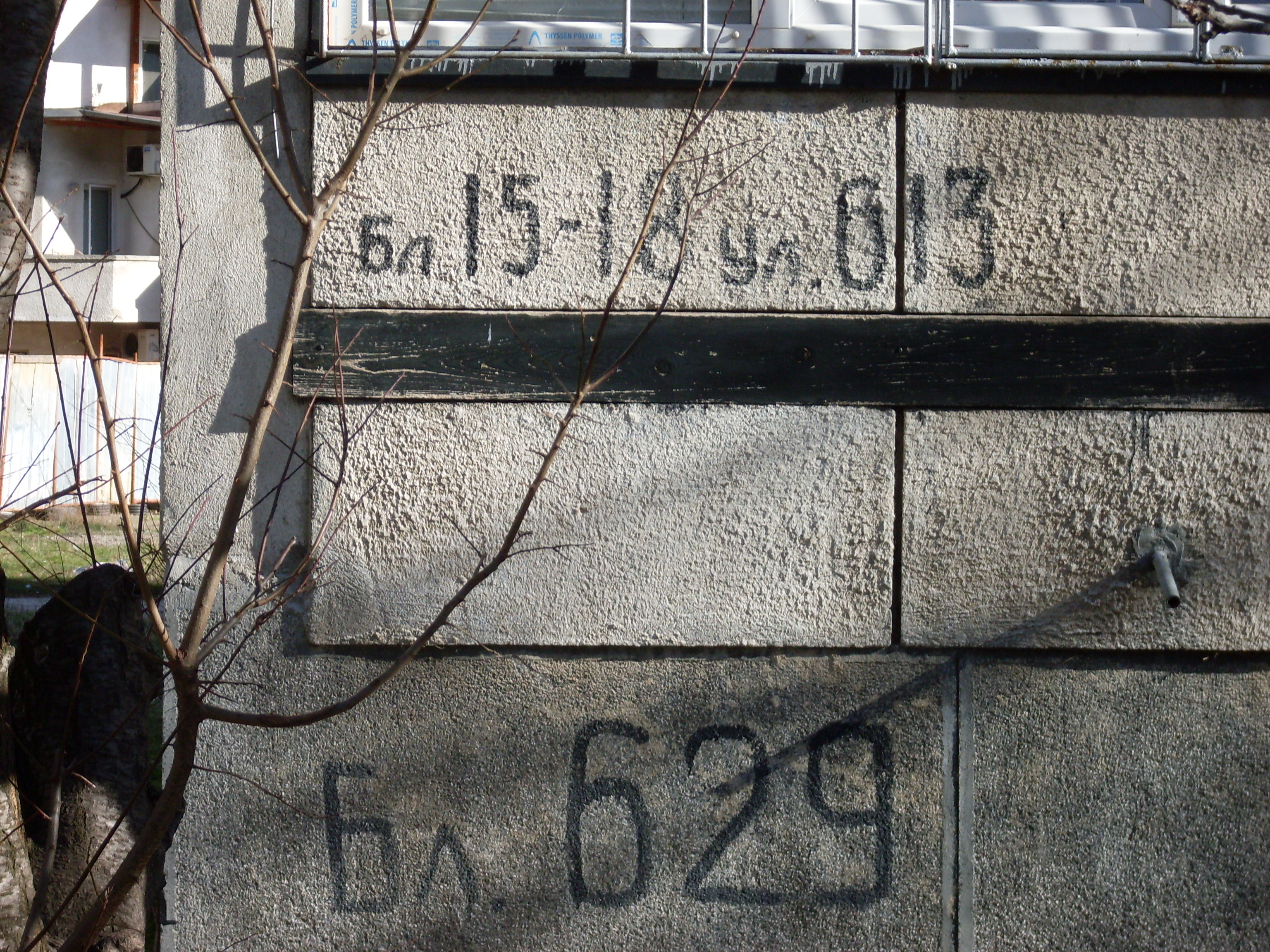 Номера на блок в Люлин по старата и по новата номерация.